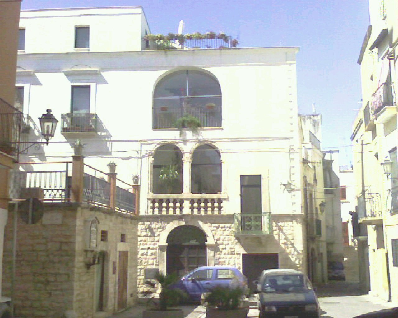 palazzo russo- Modugno (bari)-Italy